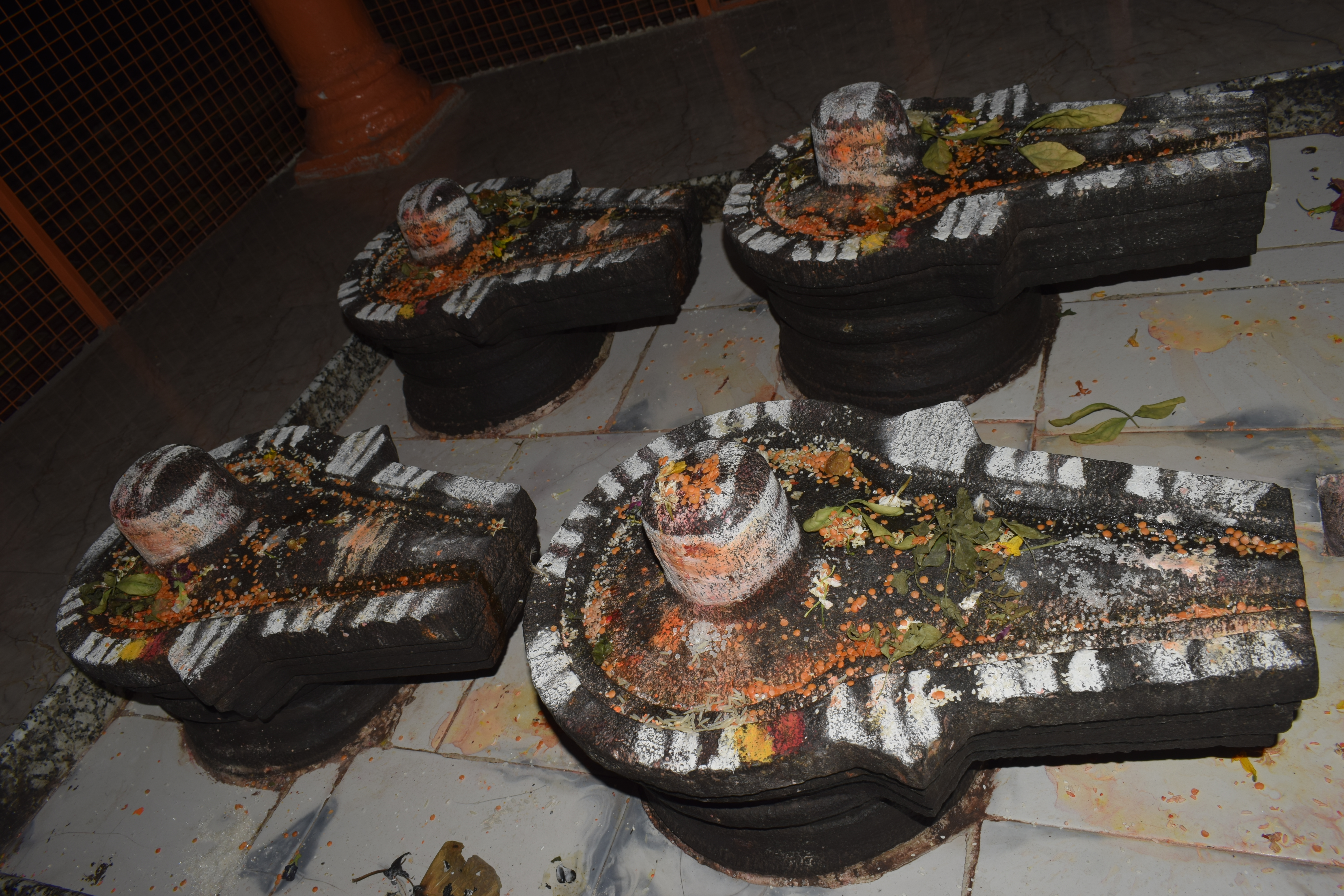 श्री नागेश्वर लिंग